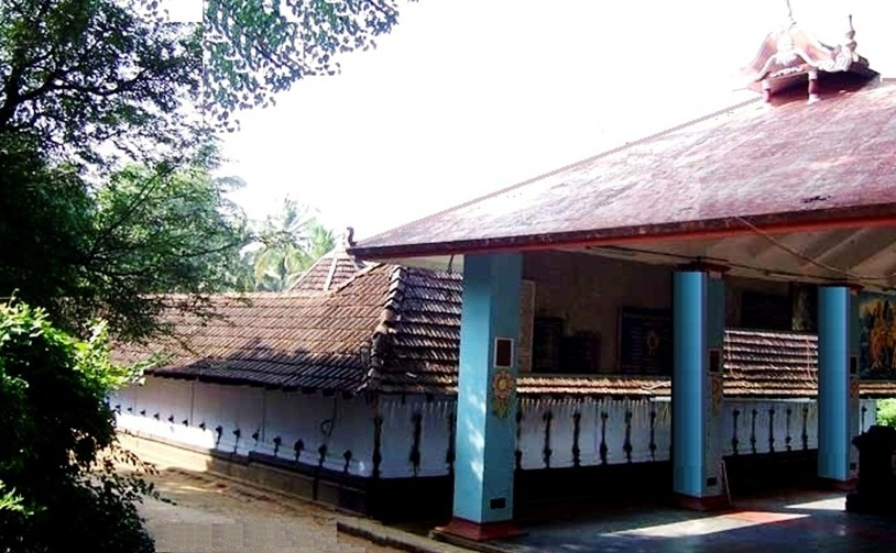 പനഞ്ചേരി മുടിക്കോട്ട് ശിവക്ഷേത്രം, തൃശ്ശൂര്‍